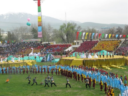 Праздничное представление в парке, г. Душанбе